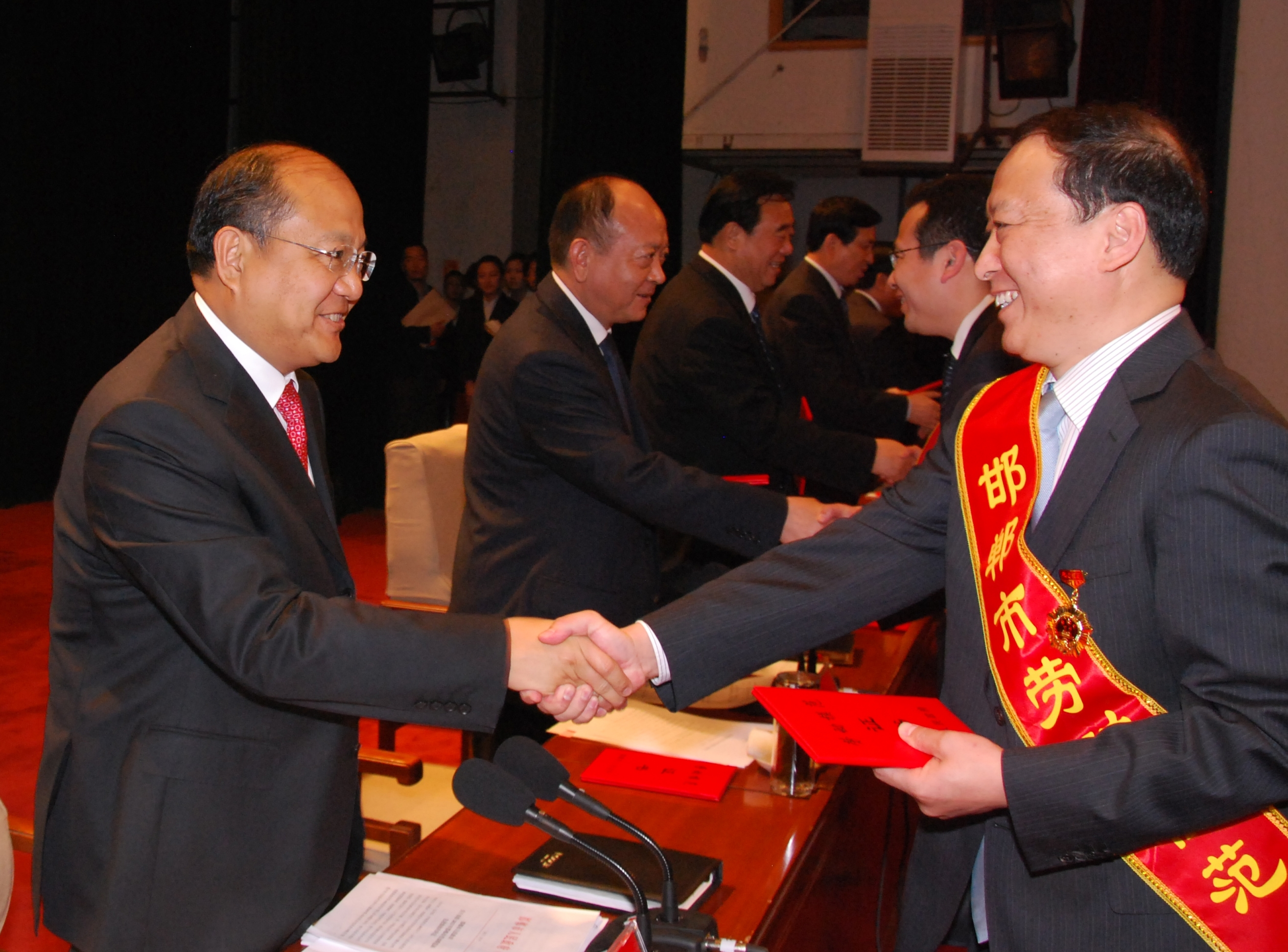 邯郸市市委书记高宏志和邯郸市自来水公司经理高春华。